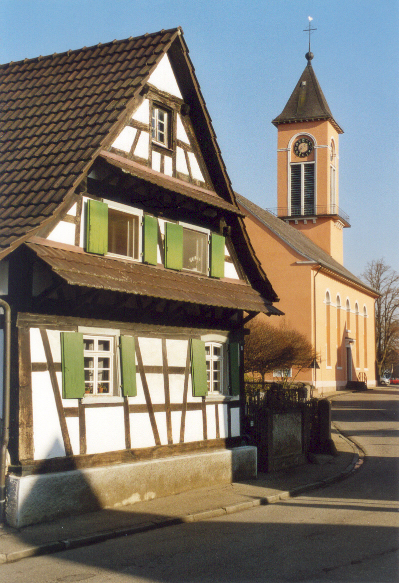 Die Neuried-Altenheimer Kirche im Weinbrenner-Stil, erbaut 1813. Eine der schönsten klassizistischen Kirchen in Baden.